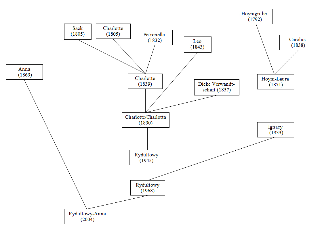 Fusionen innerhalb des KWK Rydułtowy-Anna